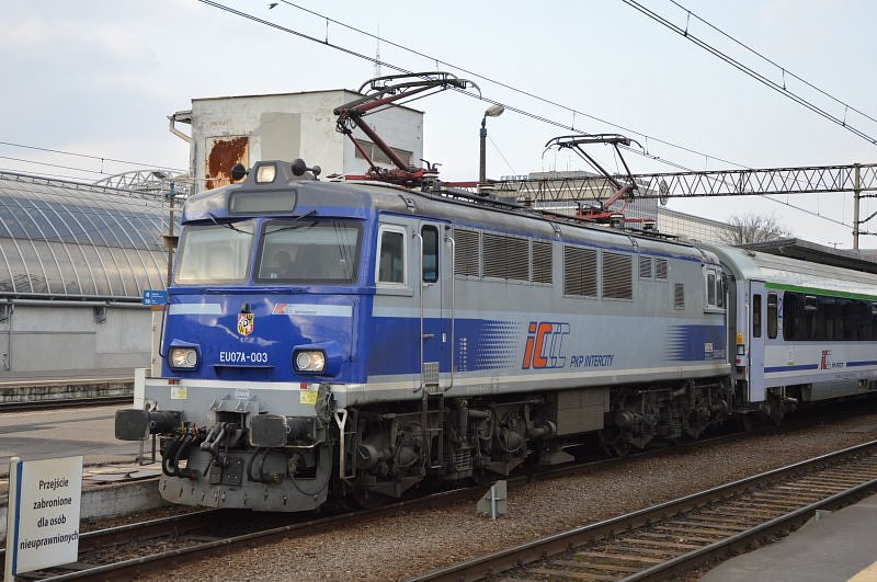 Elektrowóz EU07A-003 na stacji Poznań Główny.